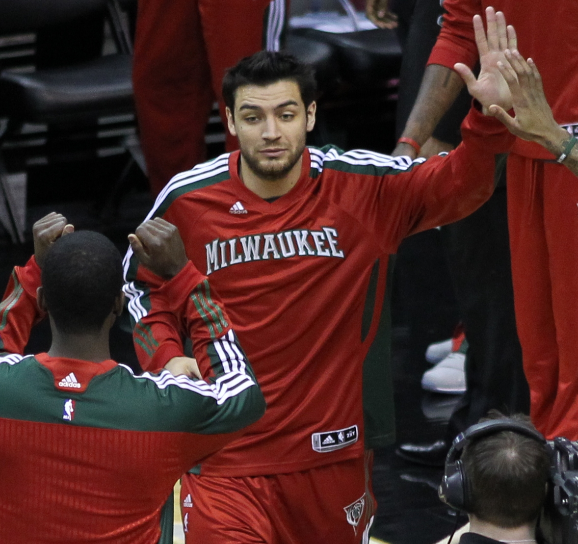 Wizards v/s Bucks 03/08/11